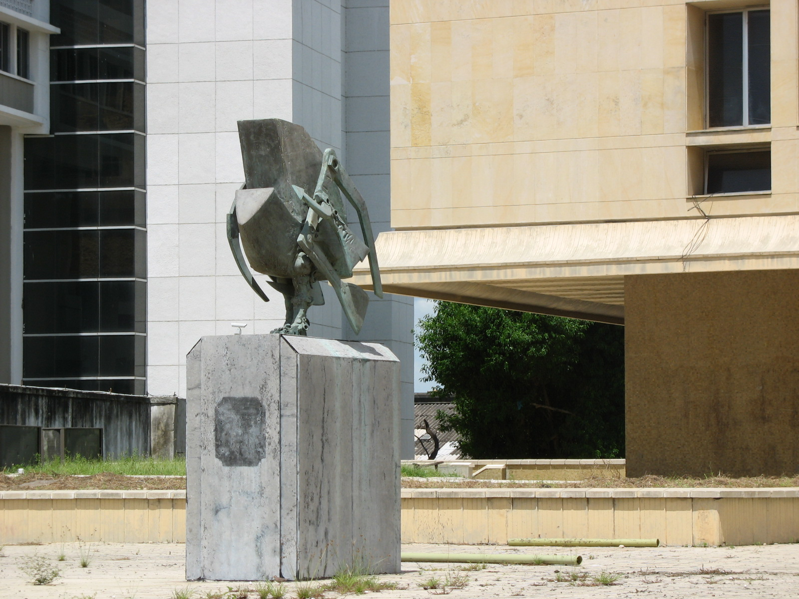 Escultura en el Centro Cívico